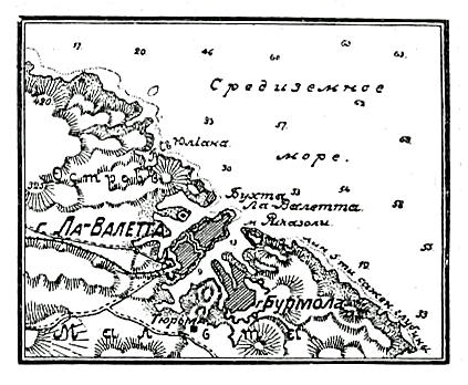 Эта фотография была использована для иллюстрирования статьи «Мальта» опубликованной в пятнадцатом томе «Военной энциклопедии», который был издан книгоиздательским товариществом И. Д. Сытина в 1914 году в столице Российской империи городе Санкт-Петербурге. Более подробное описание к этому рисунку можно прочесть в указанной выше статье на сайте Русской Викитеки.